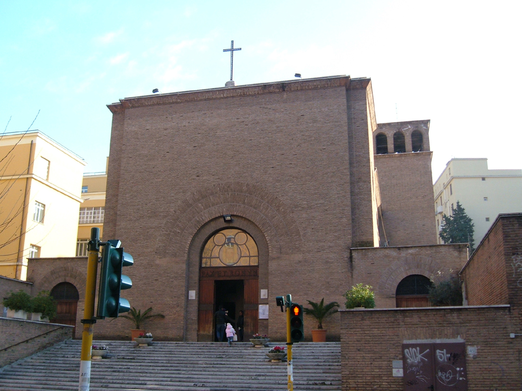 Chiesa di Sant'Ippolito, a Roma, nel quartiere Nomentano.